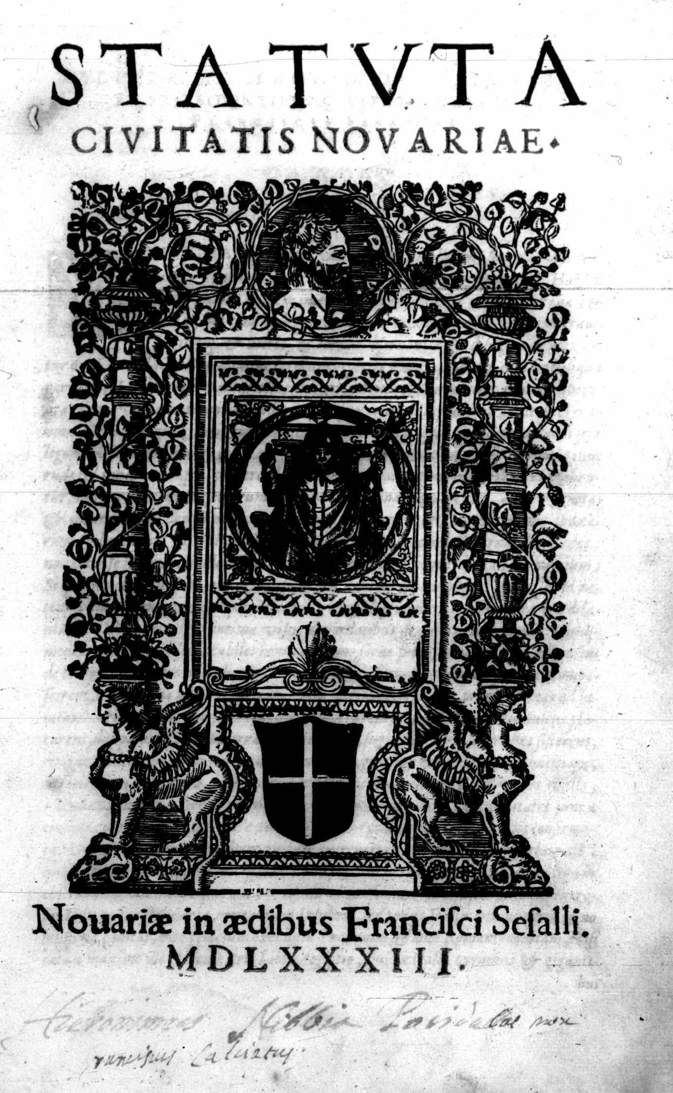 Frontespizio